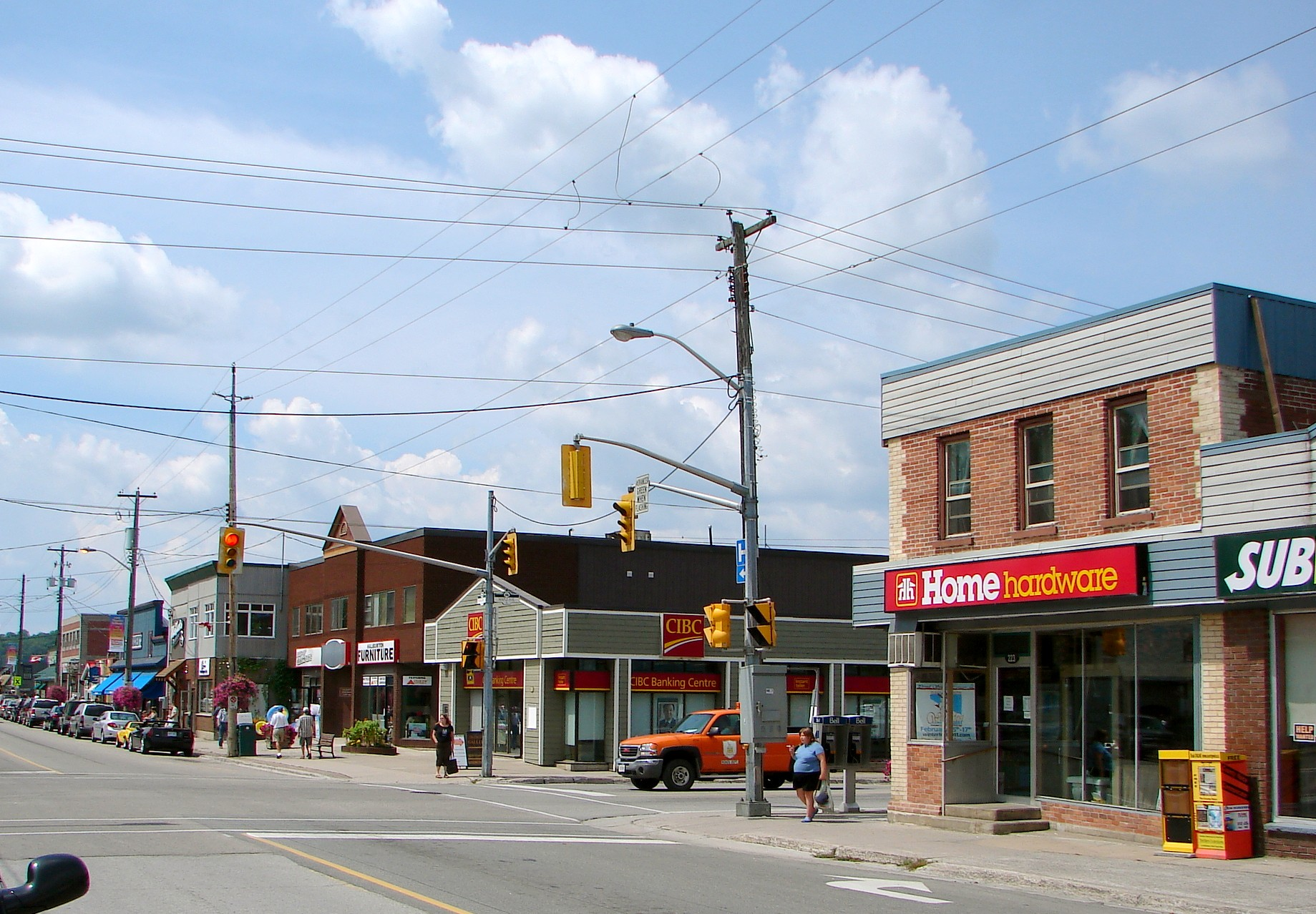 Haliburton, Ontario, Canada